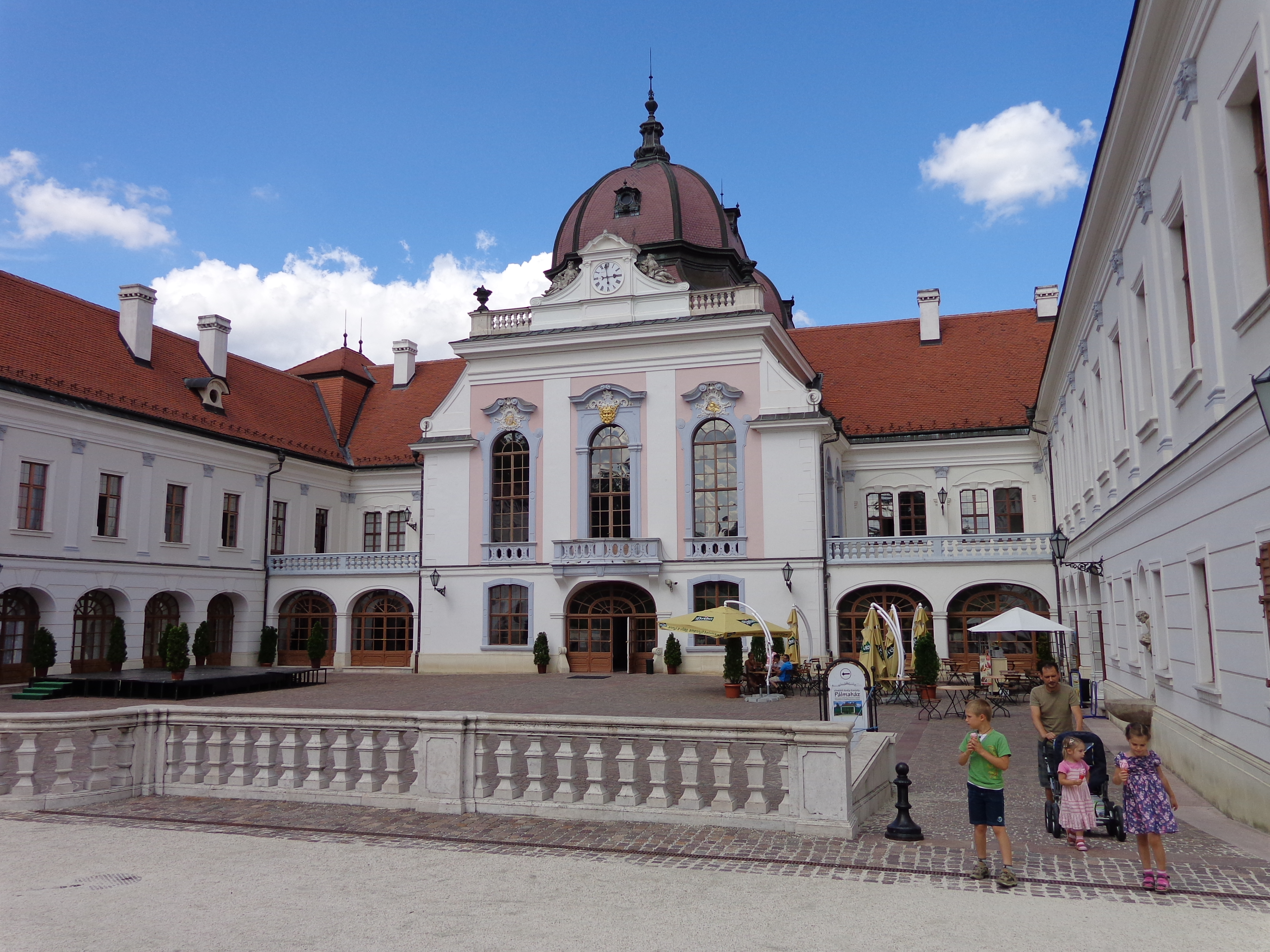 Grassalkovich-kastély együttese és parkja This is a photo of a monument in Hungary. Identifier: 7051